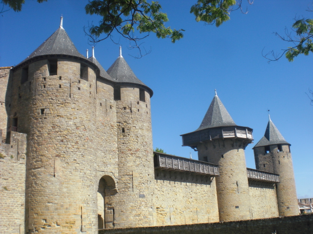 Citadelo de Karkasuno